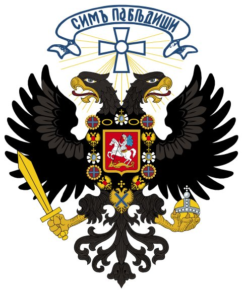 Проект российского герба 1919 года (правительство Колчака)